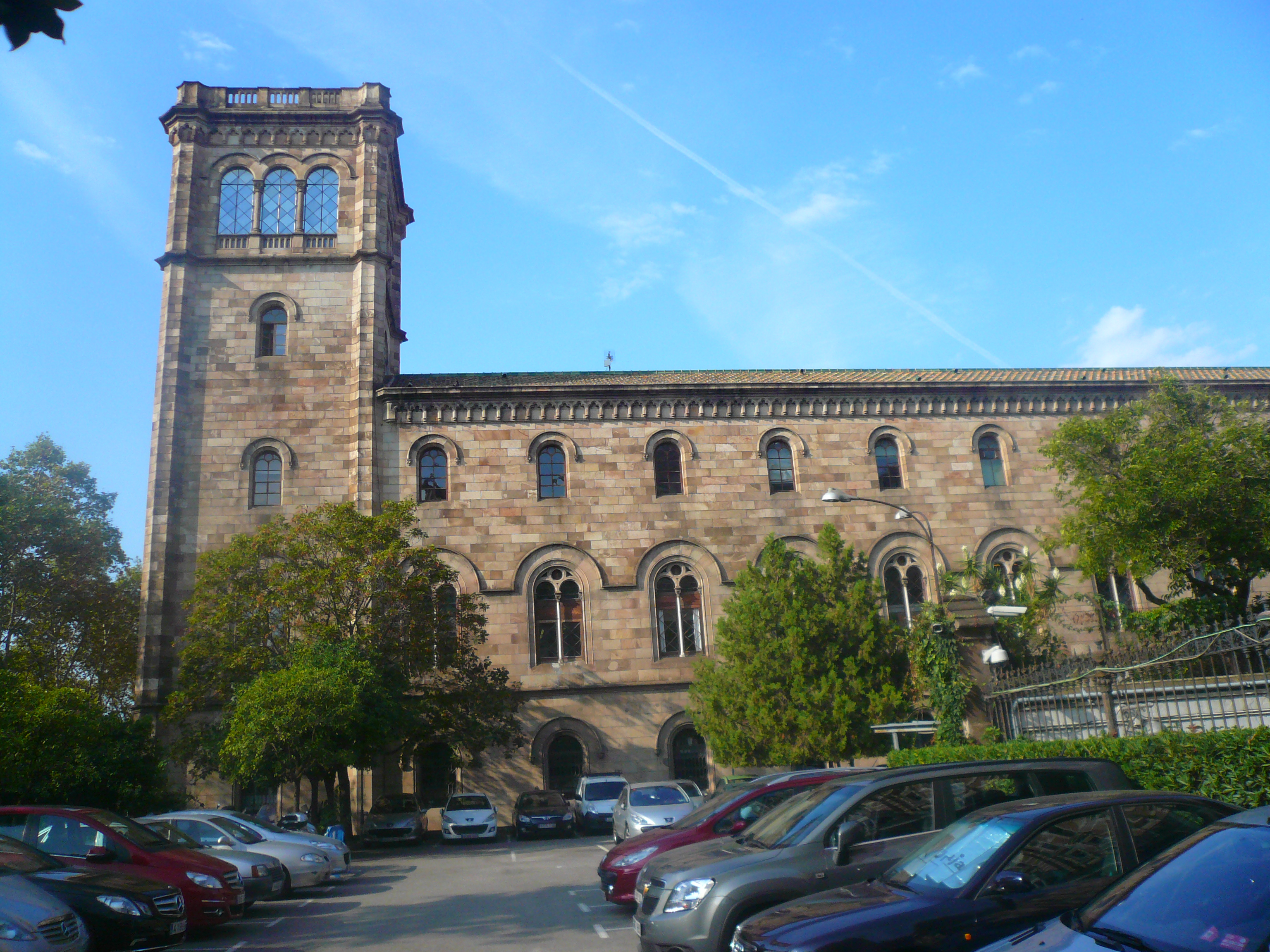 Edifici de la Universitat (Barcelona)